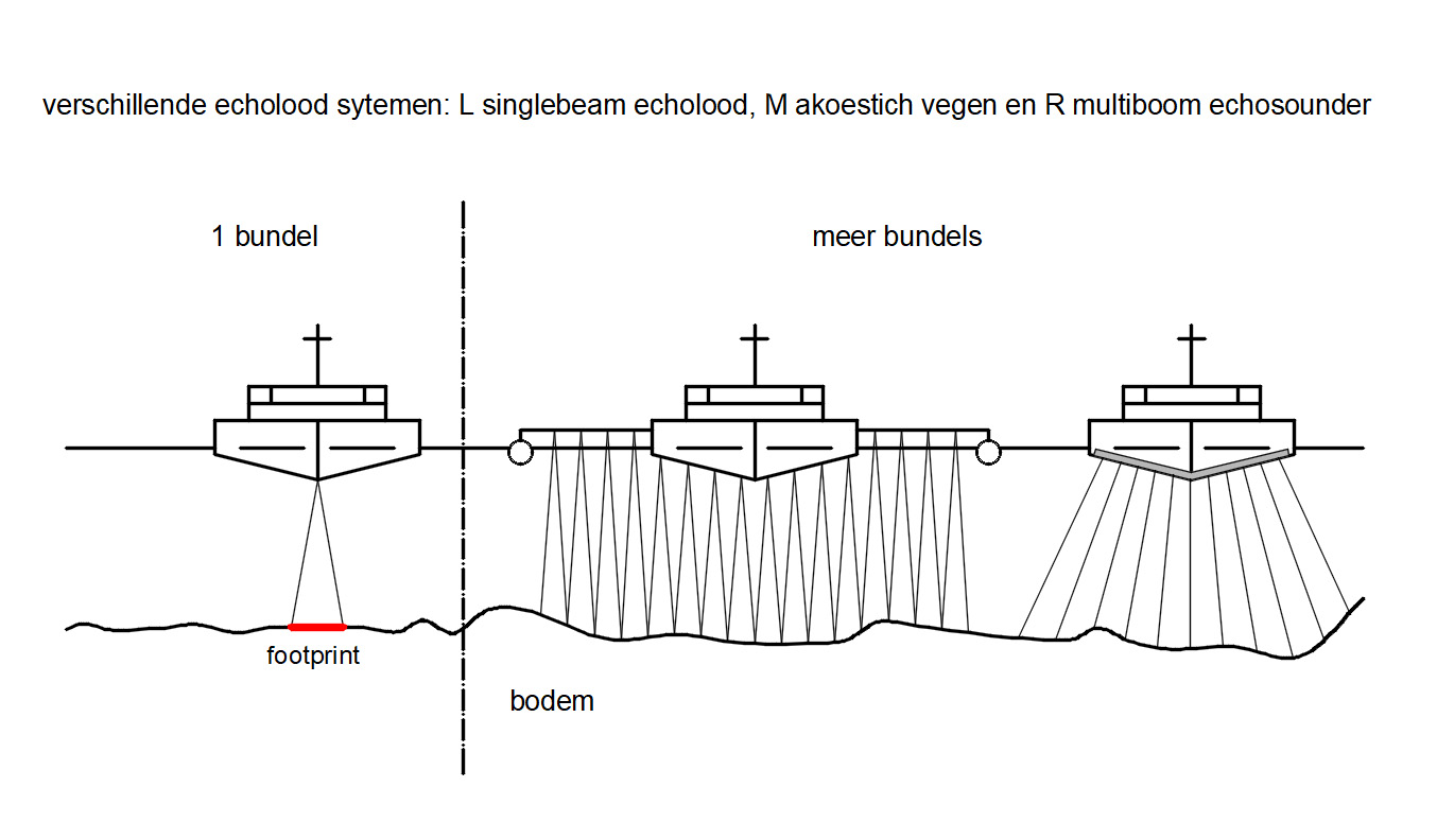 Overzicht verschillende echosoundersystemen